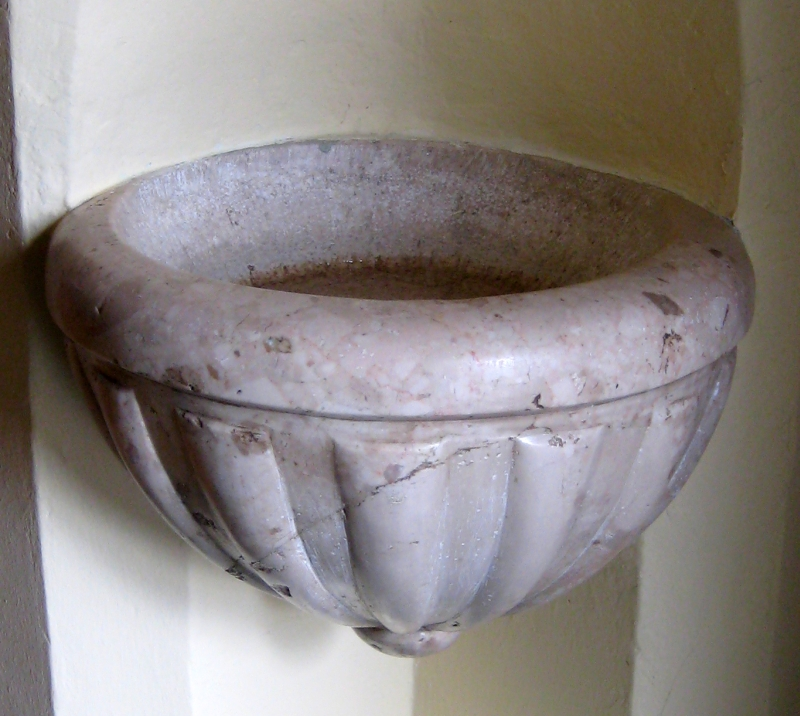 kamenica s blagoslovljenom vodom u crkvi Svete Katarine u Selcu, Hrvatska